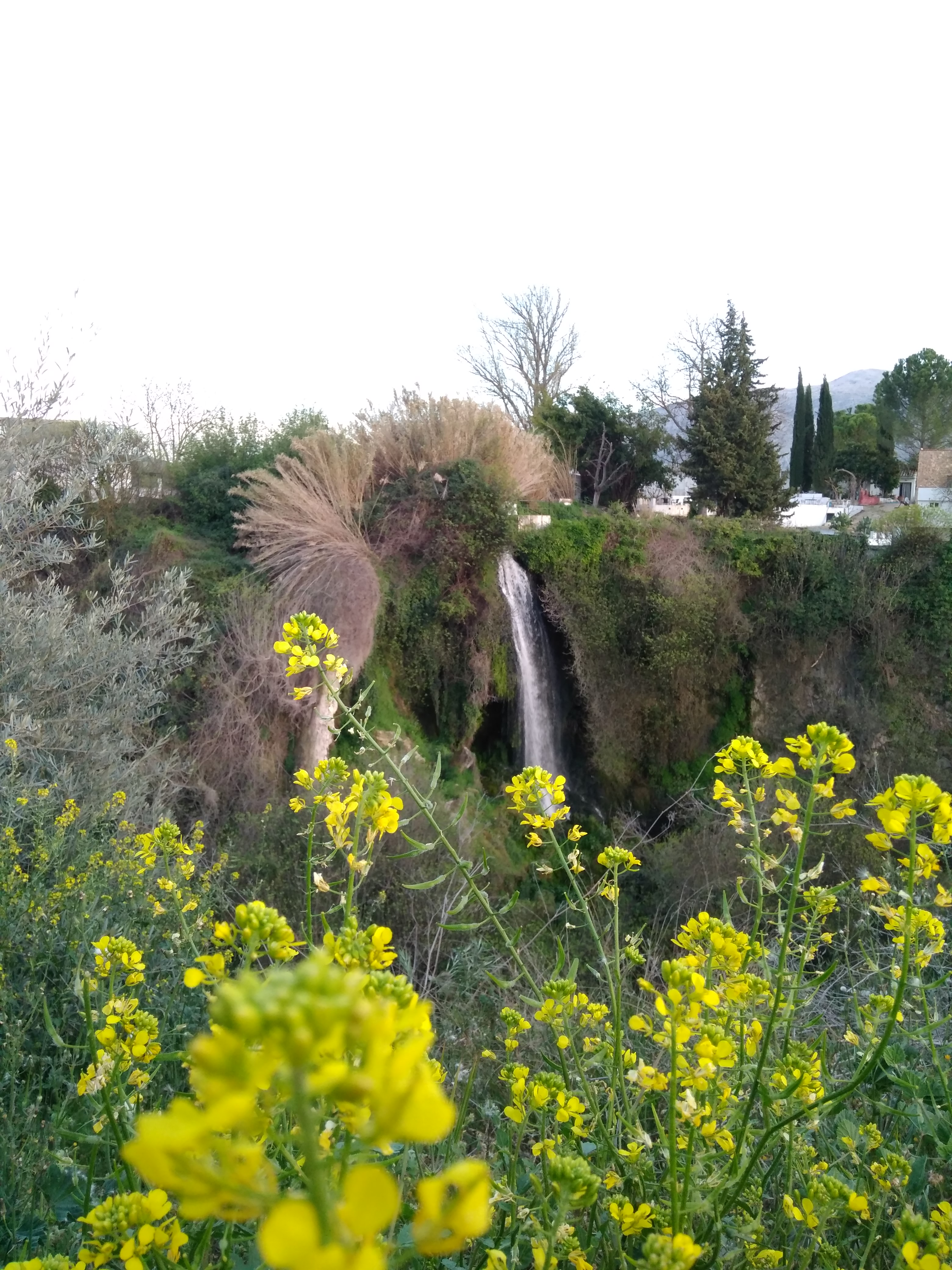 En ella podemos ver el paraje de Los Infiernos de Loja, concretamente la casaca llamada Cola del Caballo de unos 9 metros de altura.